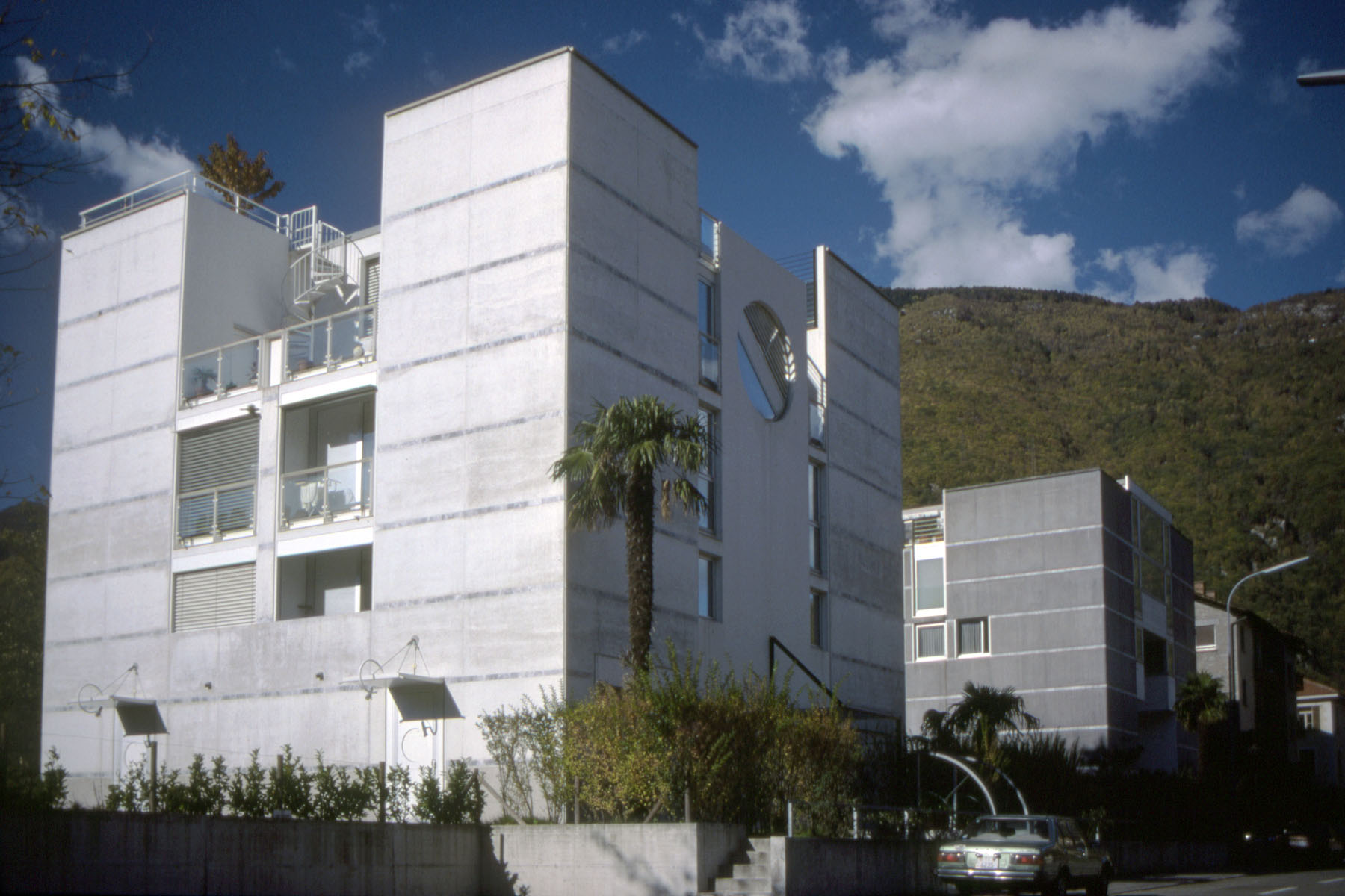 Bellinzona, Bianco e Nero (arch. Aurelio Galfetti 1985-86)